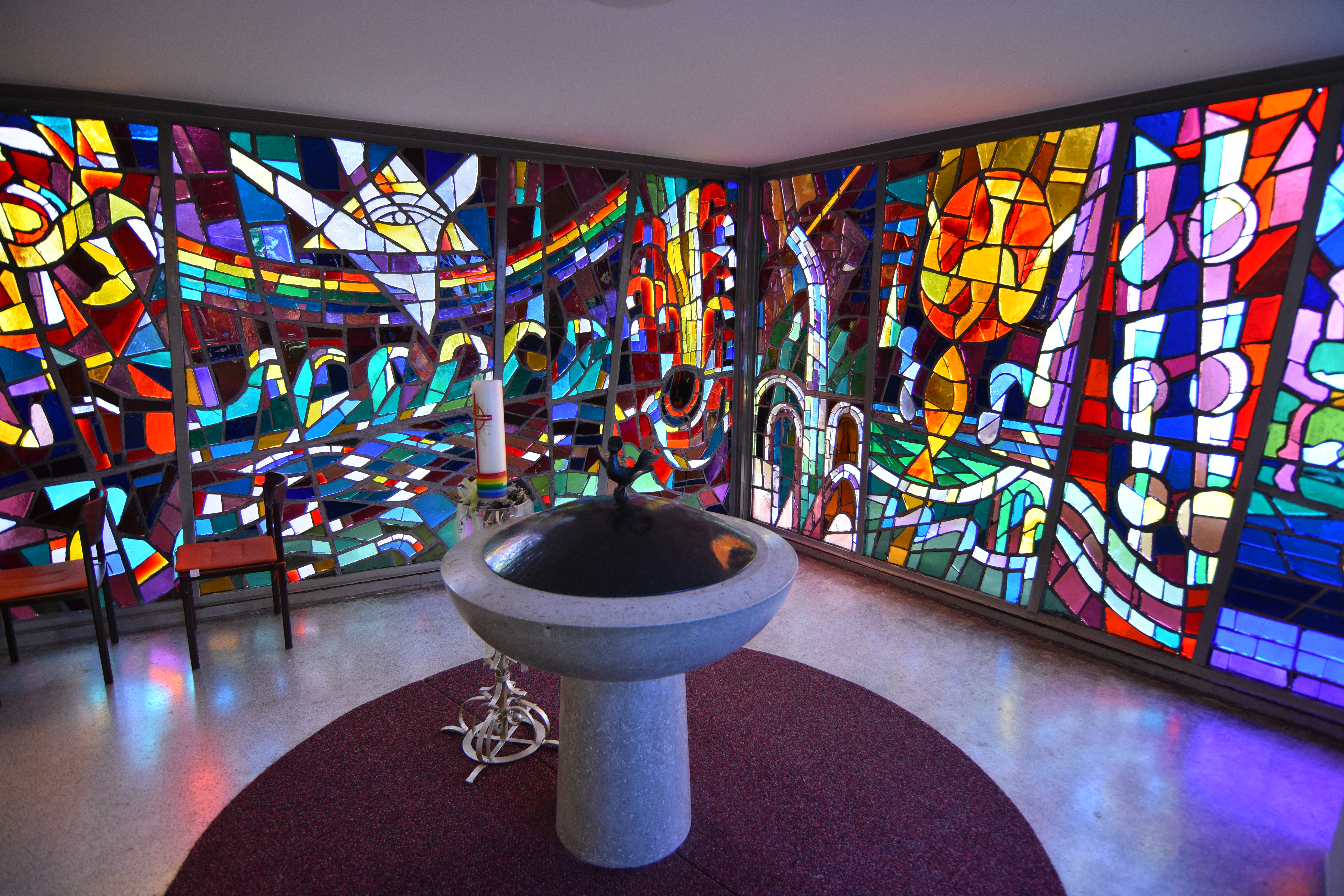 Pfarrkirche Laßnitzhöhe Interior